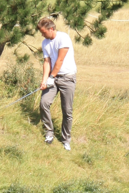 Winston Gerschtanowitz